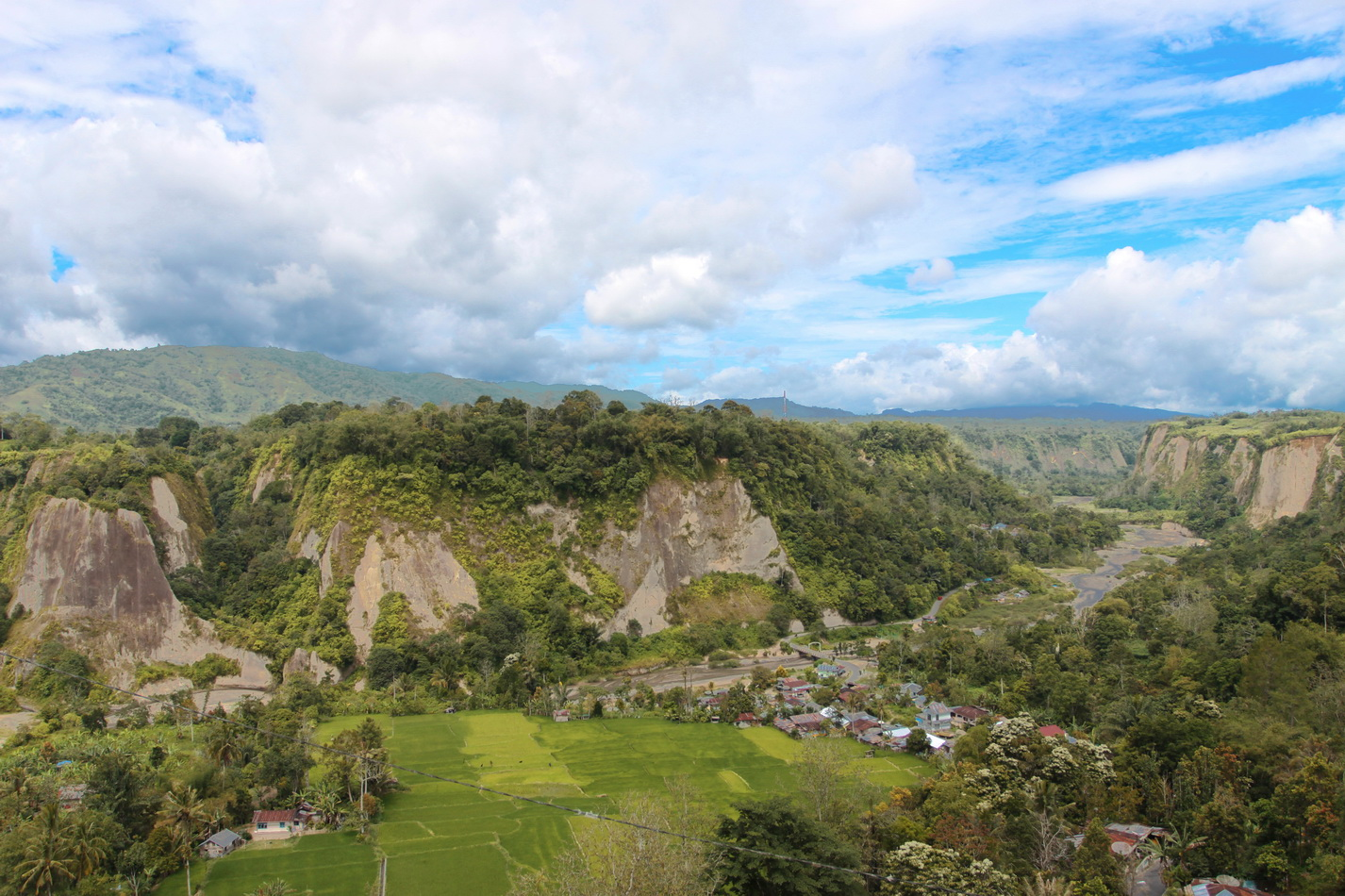 Ngarai Sianok Licensing